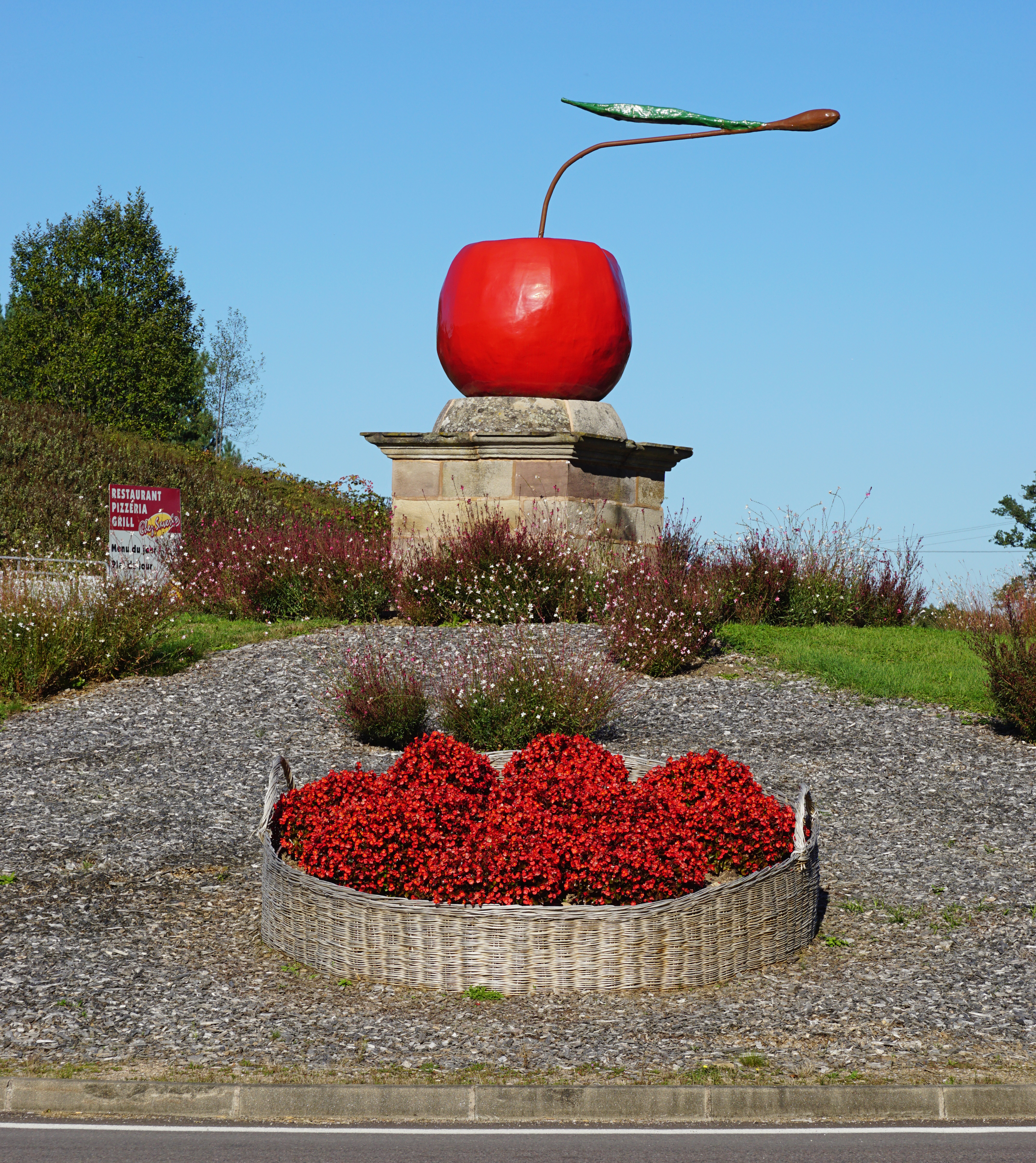 Sculpture d'une cerise sur un rond-point à Fougerolles.